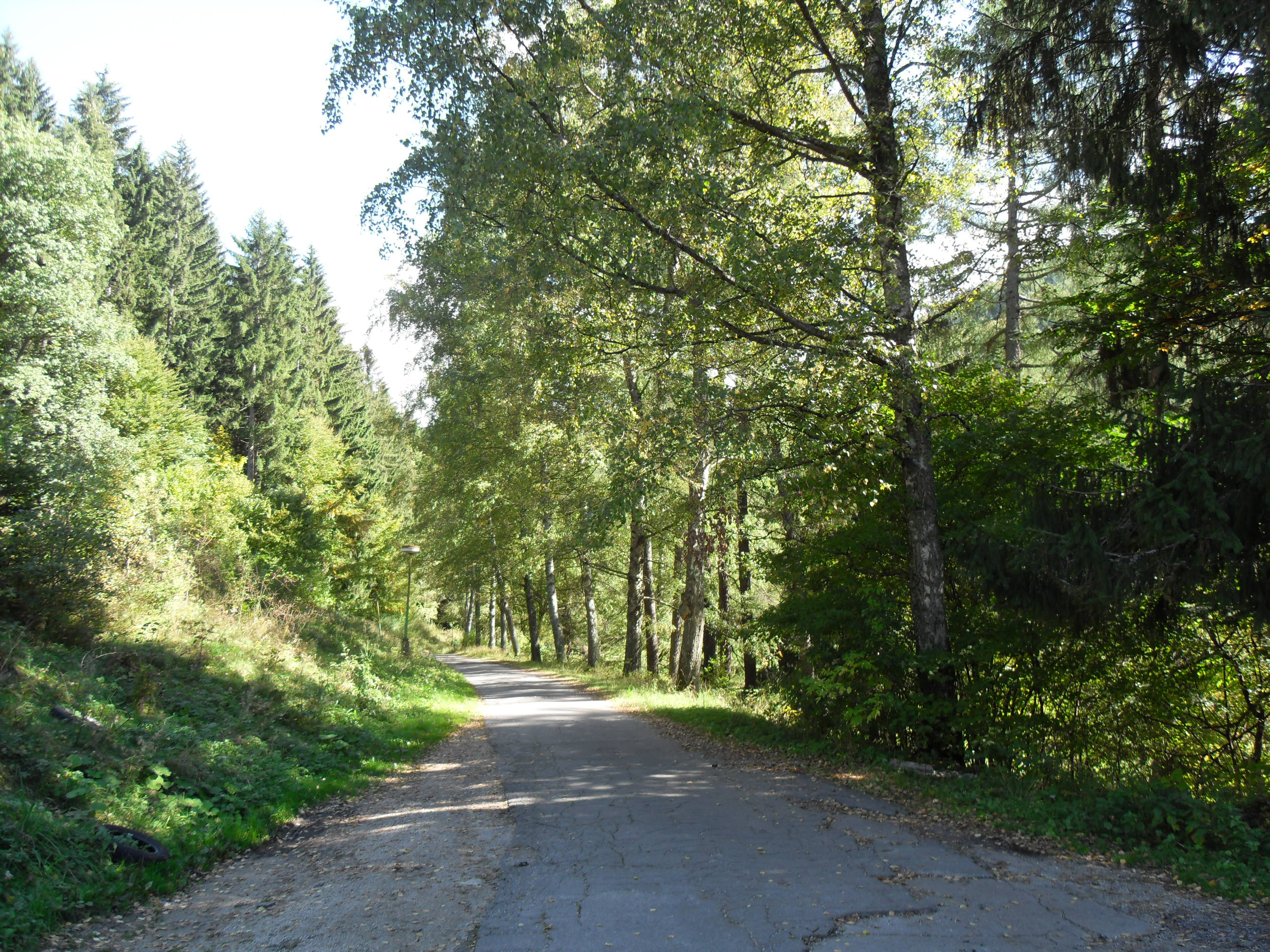 Kuneradský park pri Kuneradskom zámku.